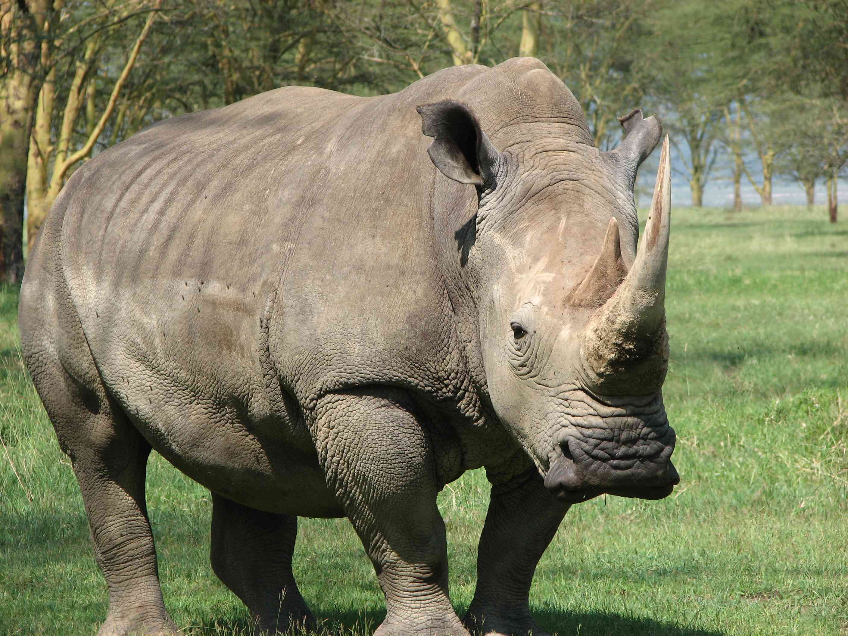 Breitmaulnashorn (Ceratotherium simum) im Lake-Nakuru-Nationalpark, Kenia